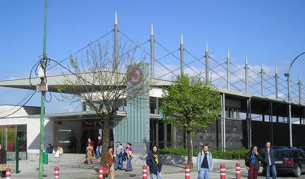 Santurtziko geltokia (Renfe Aldiriak).